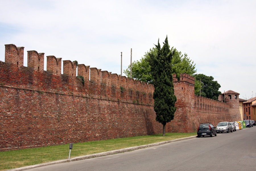 Un tratto di mura del Castello Litta di Gambolò (PV)